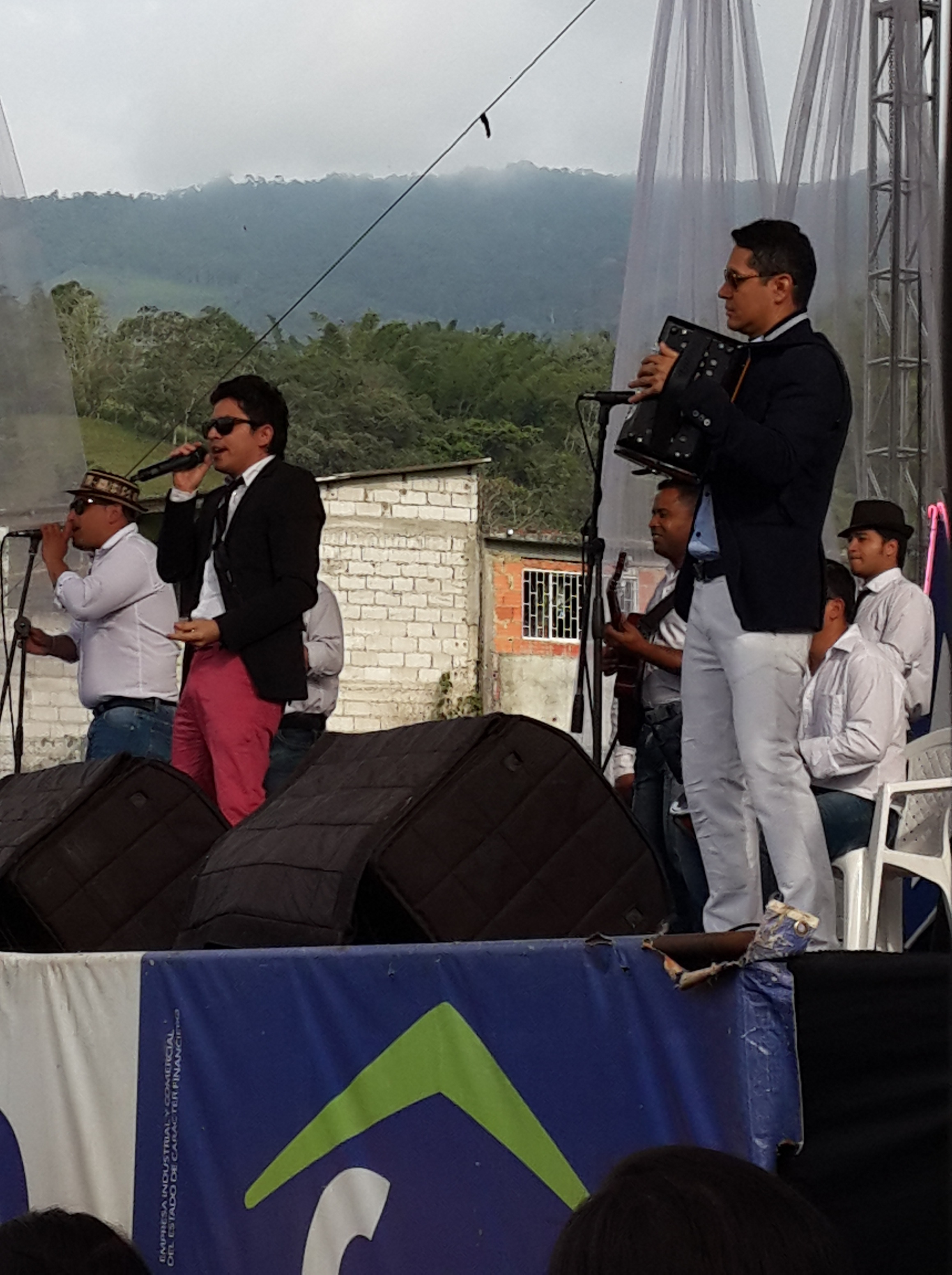 Foto de presentación en el Show de las Estrellas